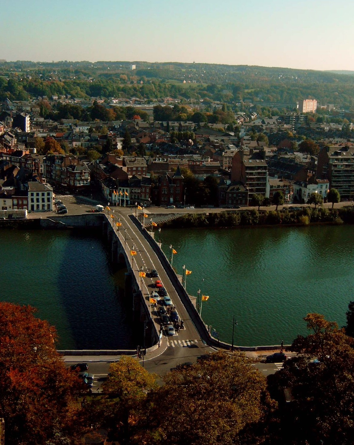 De Pont de Jambes. Eigen opname.